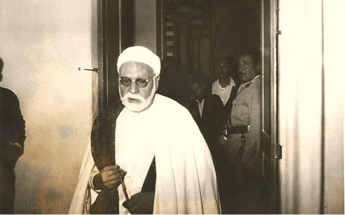 فضيلة الشيخ الإمام محمد العزيز جعيط (1970/1886) مغادرا ديوان الشريعة المطهرة.